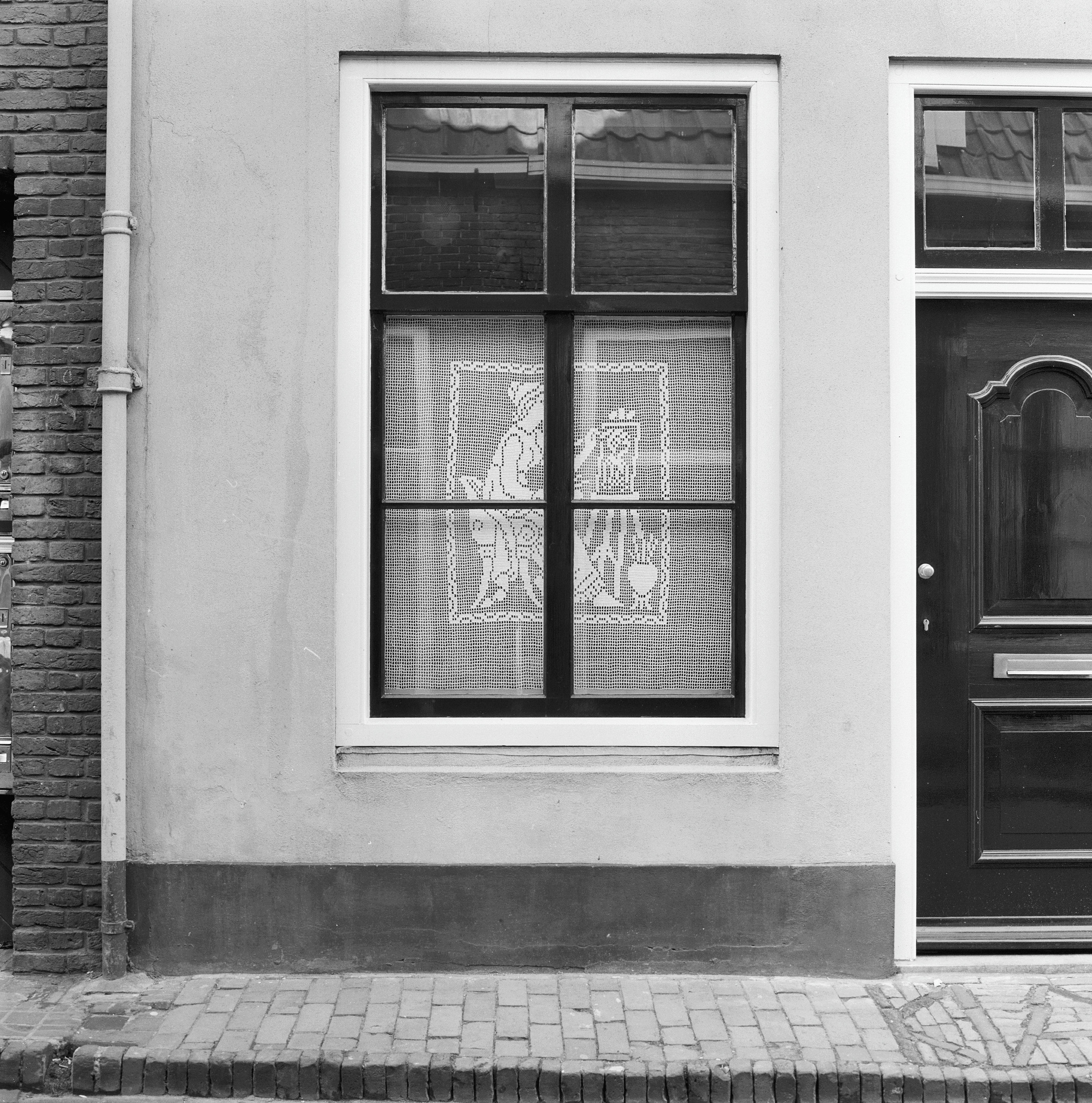 schuifraam in voorgevel begane grond